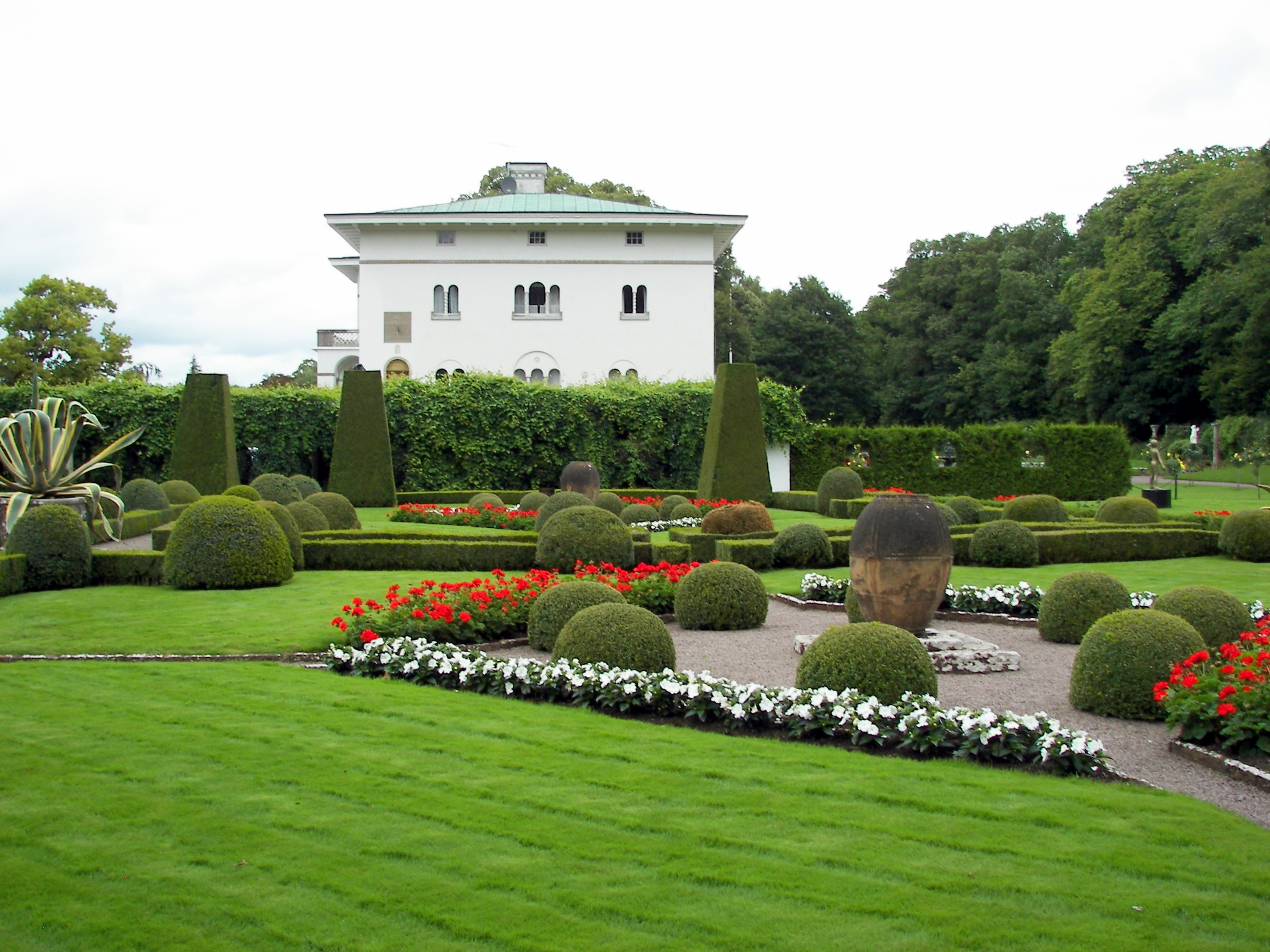 Italienska trädgården på Solliden.